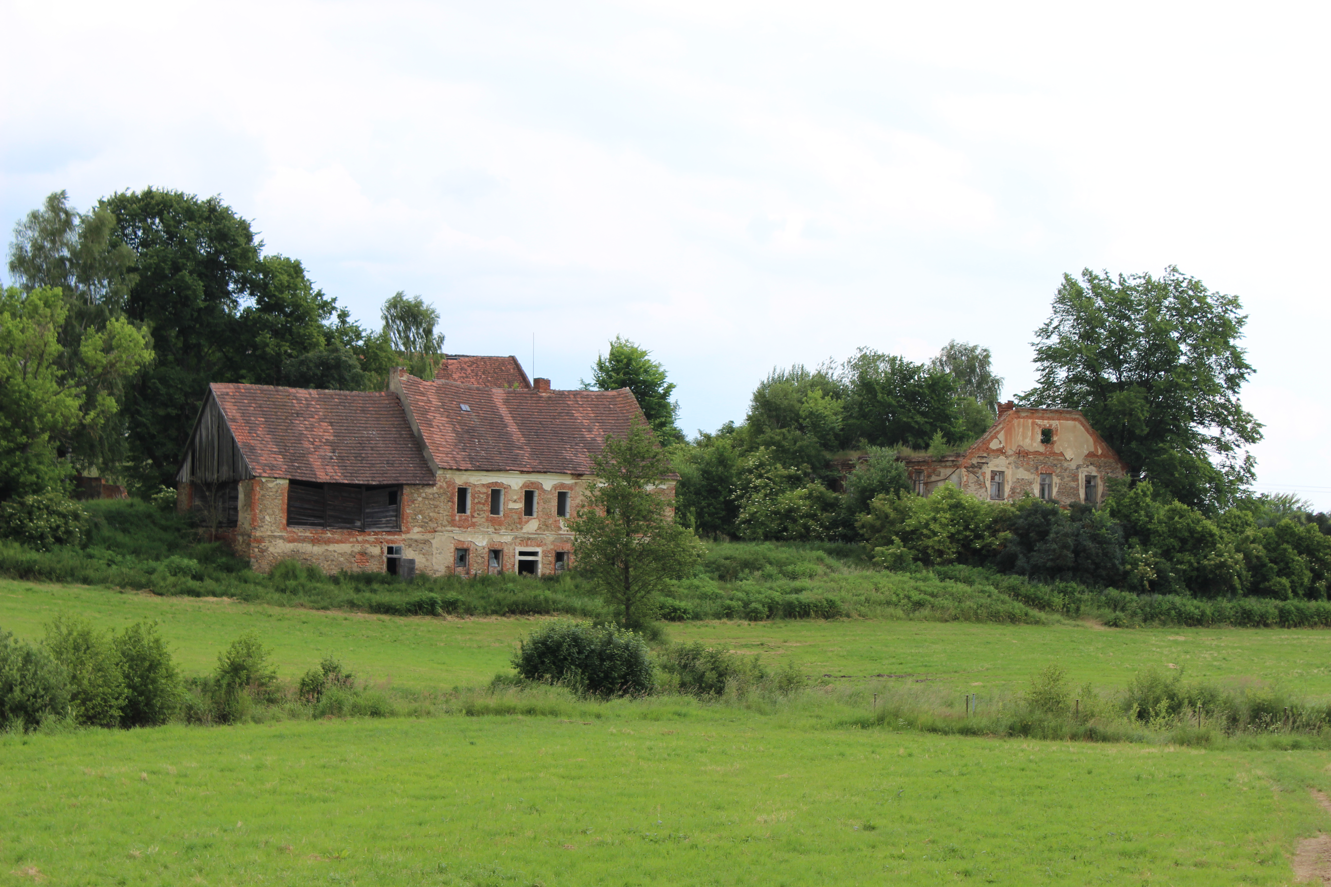 Pohled od jihozápadu na statek v Chrastovicích.